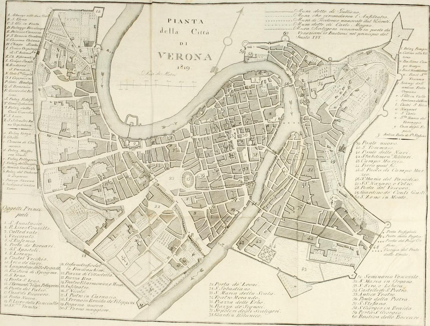 Plan of Verona. Frontispiece of Giovanni Battista Da Persico, Descrizione di Verona e della sua provincia (1820)